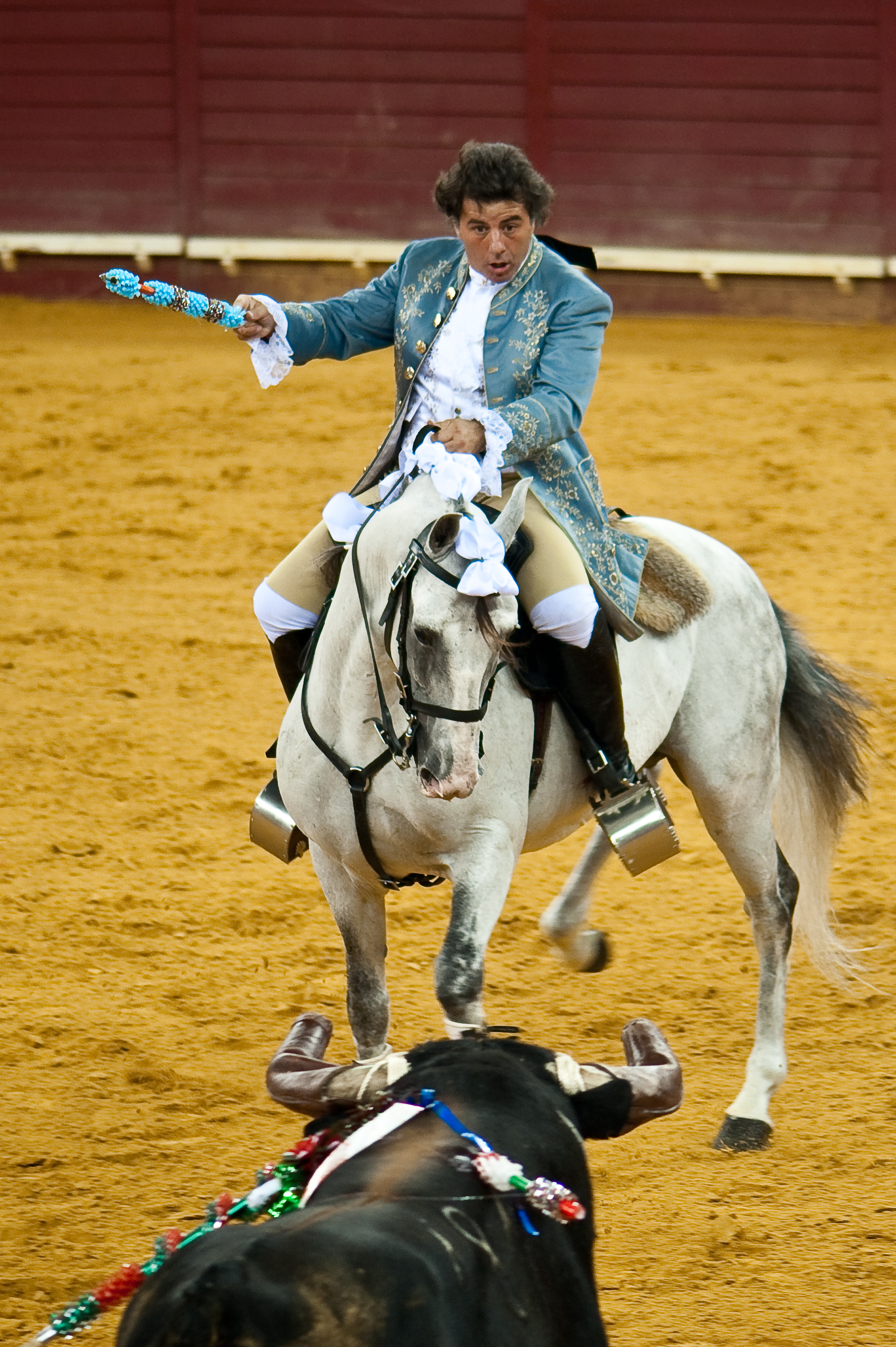 Cavaleiro Tauromáquico, numa lide a cavalo, aguarda o ataque do Touro, no Campo Pequeno.